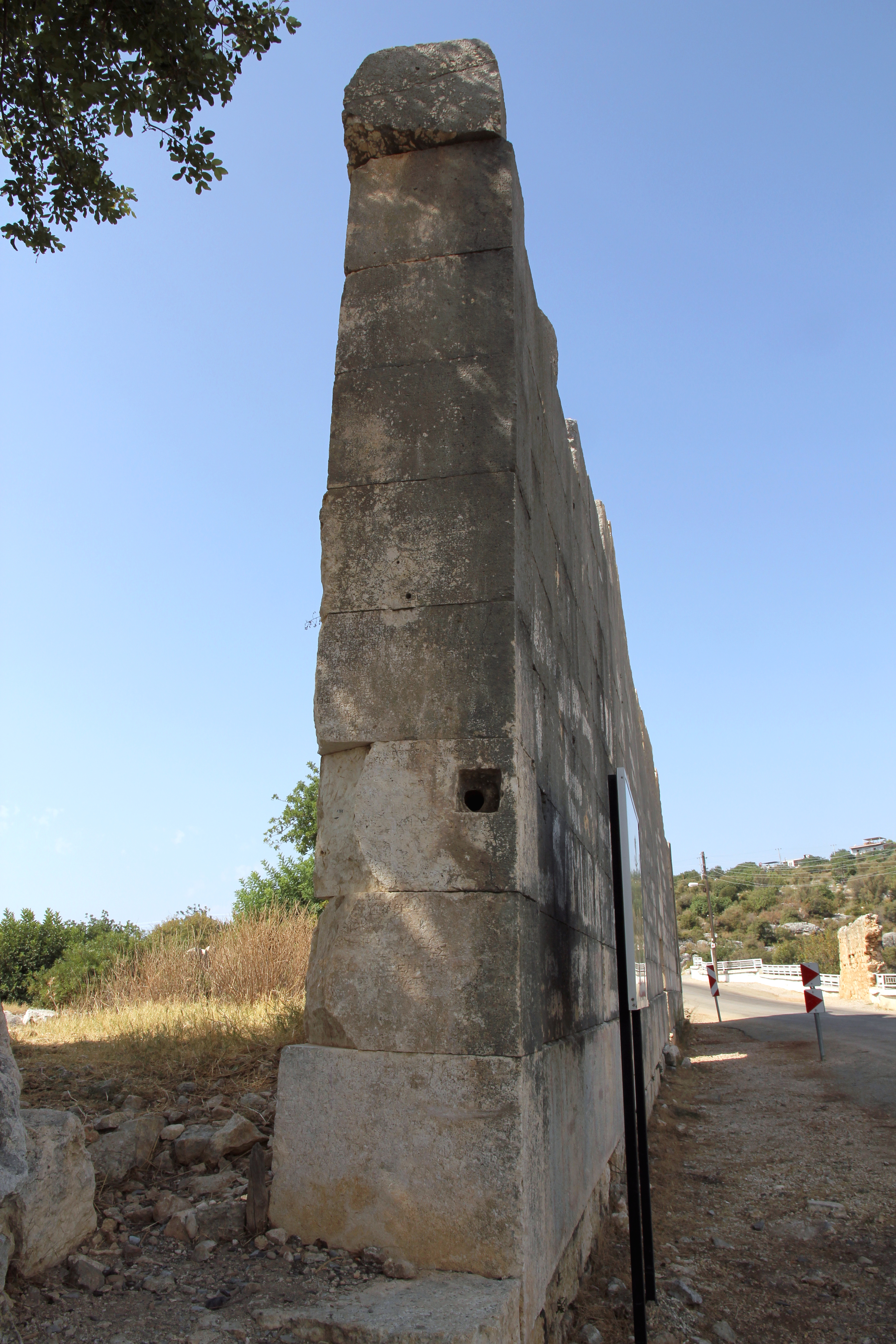 Priesterlisten am Tempel, Cennet ve Cehennem bei Silifke, Südtürkei